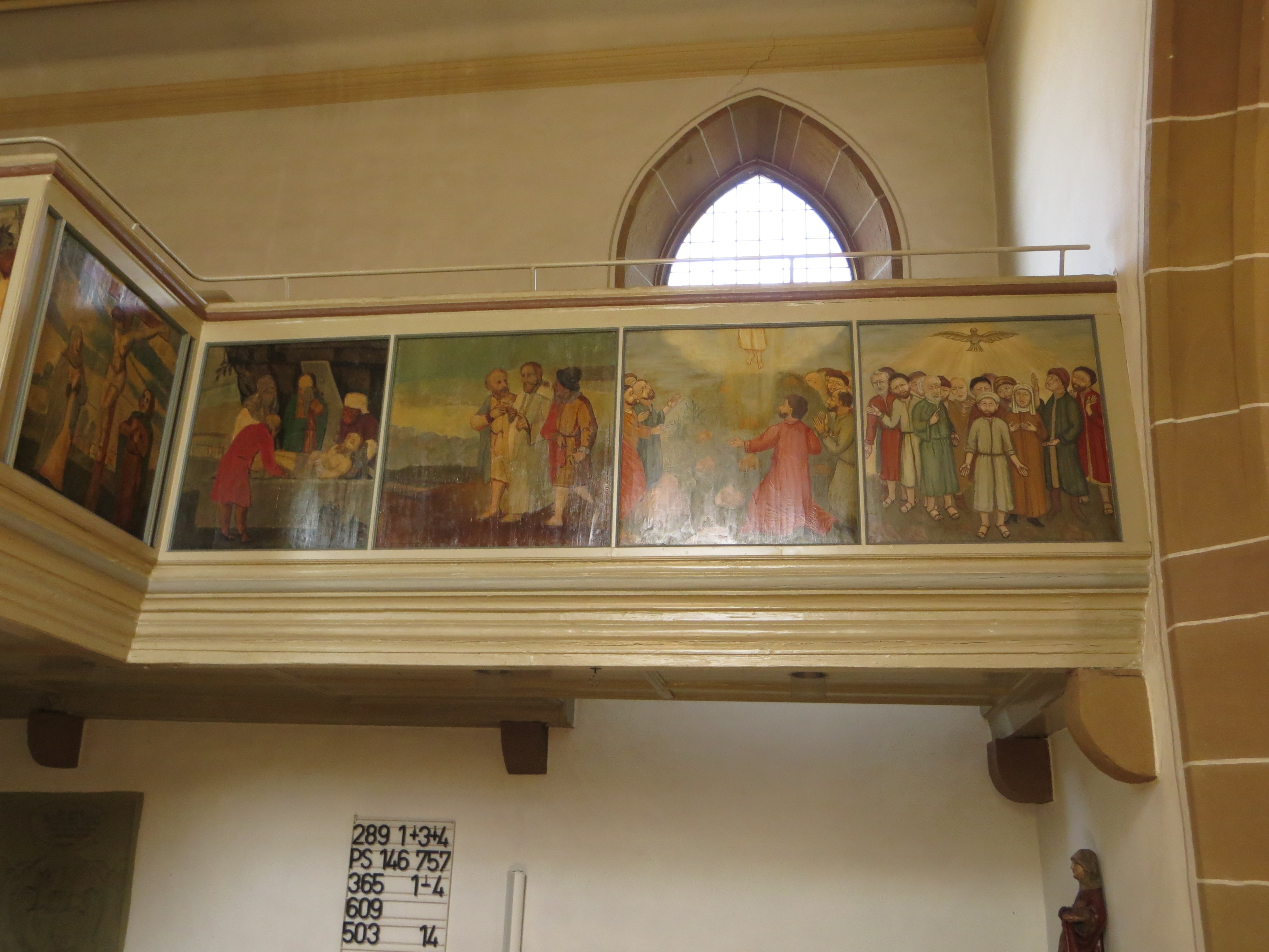 Die evangelische St.-Anna-Kirche in Beilstein. Nordempore